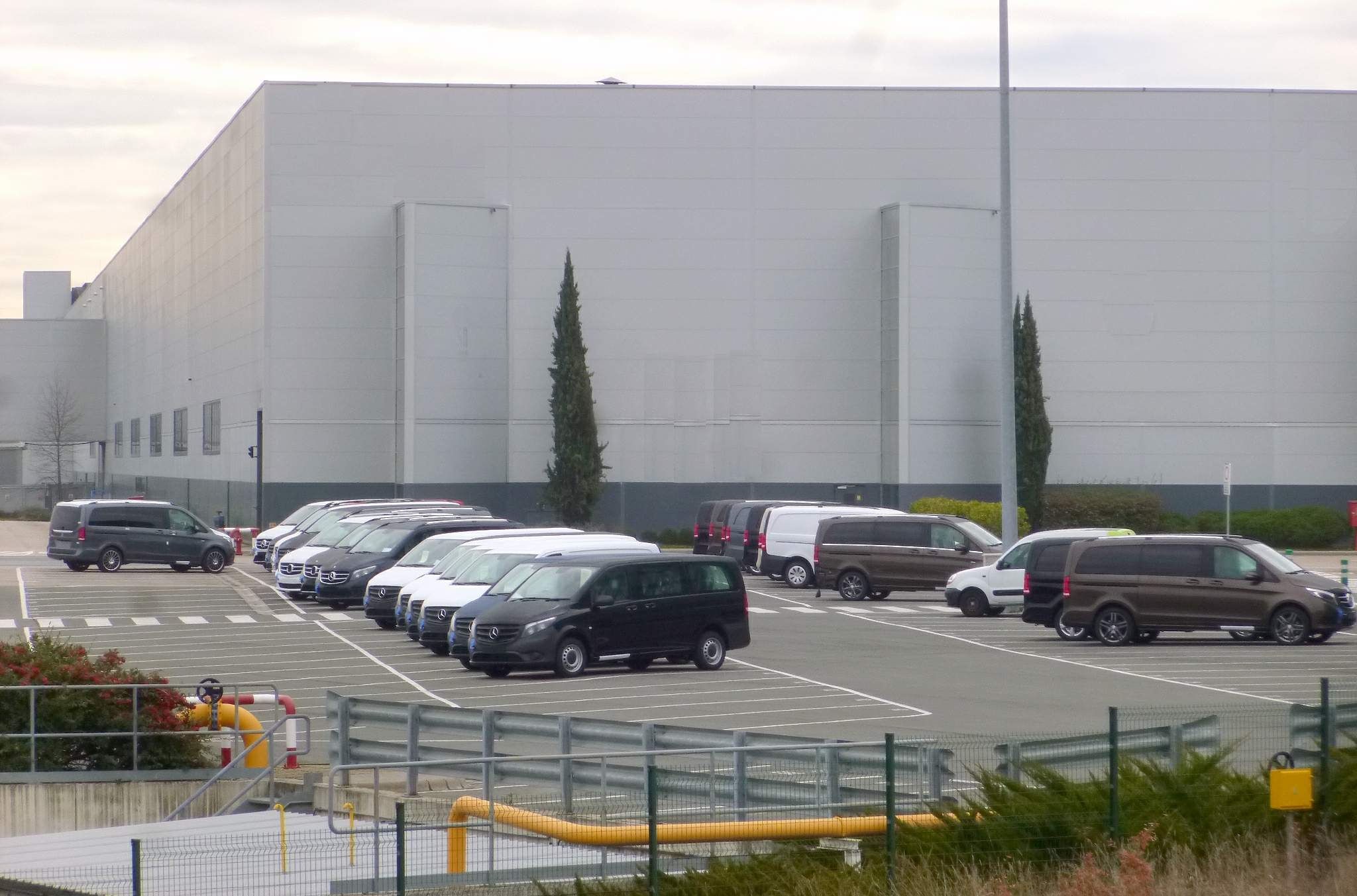 Vitoria - Fábrica de Mercedes-Benz